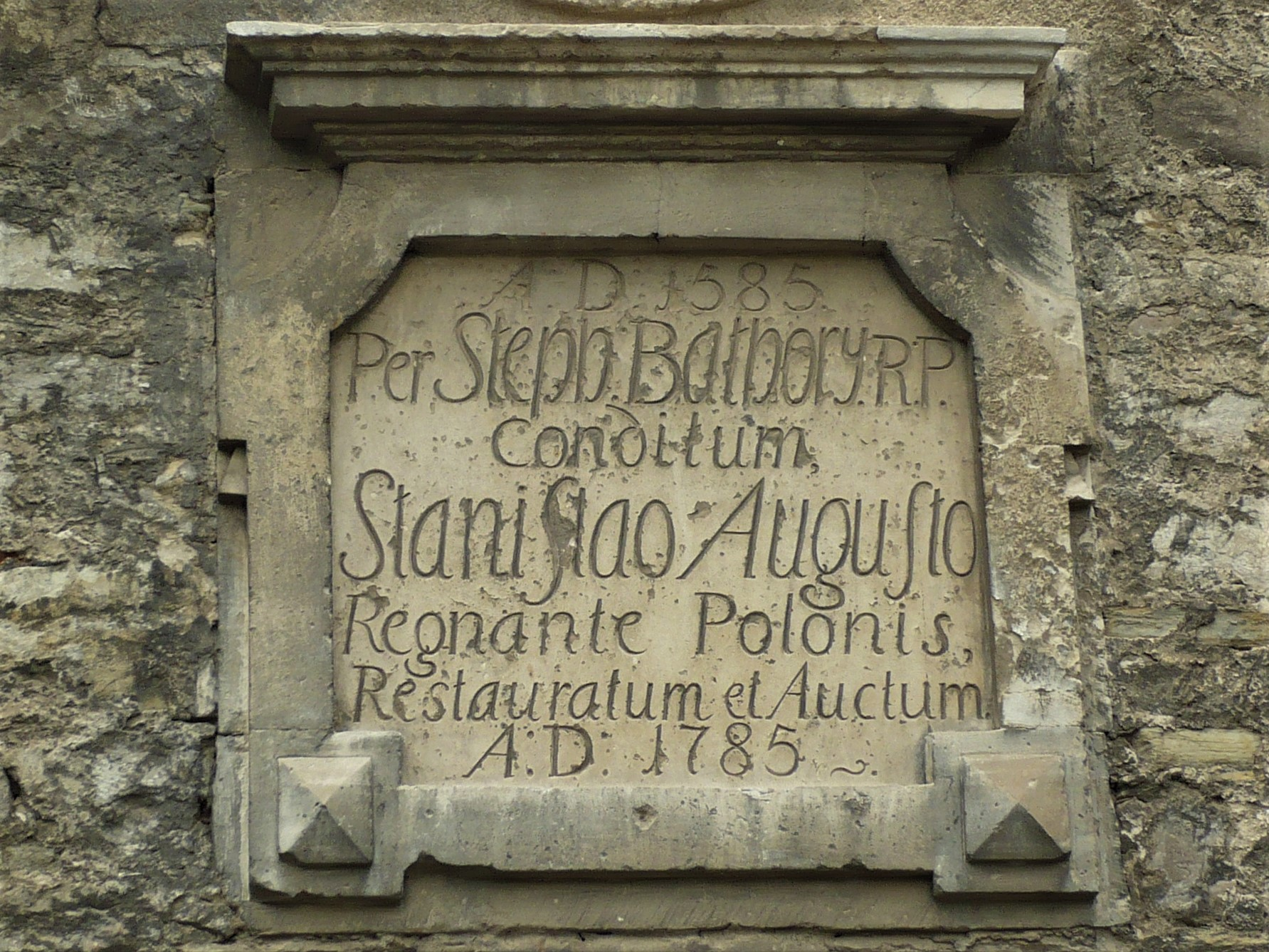 Kamieniec Podolski. Baszta Batorego. Tablica